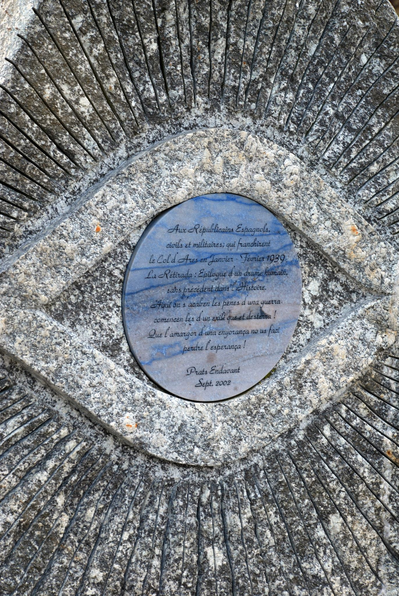 Monument al Coll d'Ares (Ripollès-Vallespir)